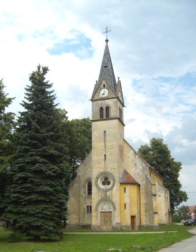 Kostel sv.Zikmunda v Rapšachu